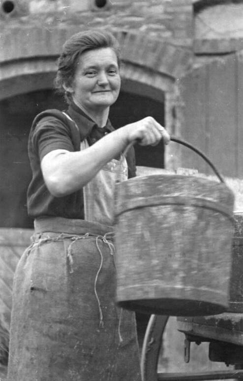 LPG Domersleben, Mitglied der LPG Zentralbild Biscan Zi-Zu 26.8.1952 Die Produktionsgenossenschaft in Domersleben, Kreis Wanzleben-Magdeburg zu der sich 16 werktätige Bauern zusammengeschlossen haben und in Zukunft mehr als 150 ha Land gemeinsam gewirtschaften, ist eine der Produktionsgenossenschaften, die sich in der DDR bisher bildeten. Die freiwillige und aktive Mitarbeit der werktätigen Bauern in Produktionsgenossenschaften ist ein Mittel zur sozailistischen Entwicklung der Landwirtschaft. UBz: Bisher die einzige Frau der Genossenschaft ist die Witwe und Neubäuerin Else Gerth mit 6,5 Hekat. Sie hat sechs Kinde, die älteste Tochter ist Traktoristin auf der MAS Domersleben.